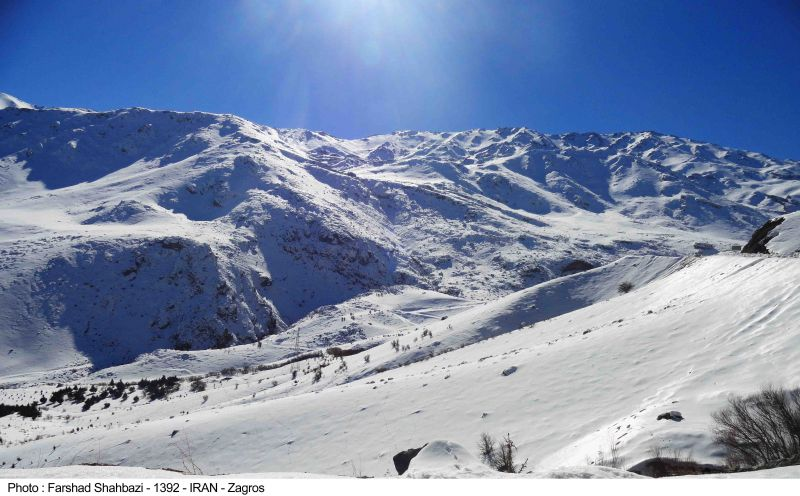 ارتفاعات گرین